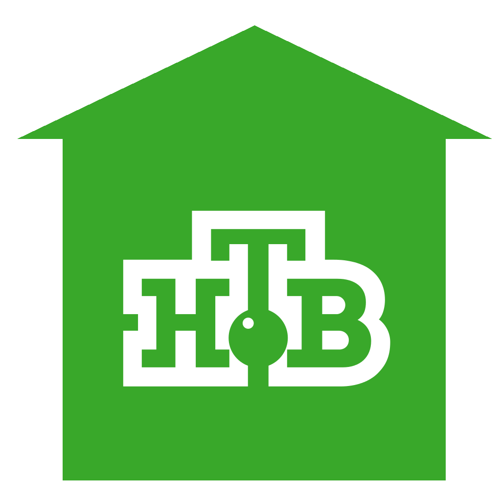 Логотип телеканала во время карантинных мероприятий 2020 года